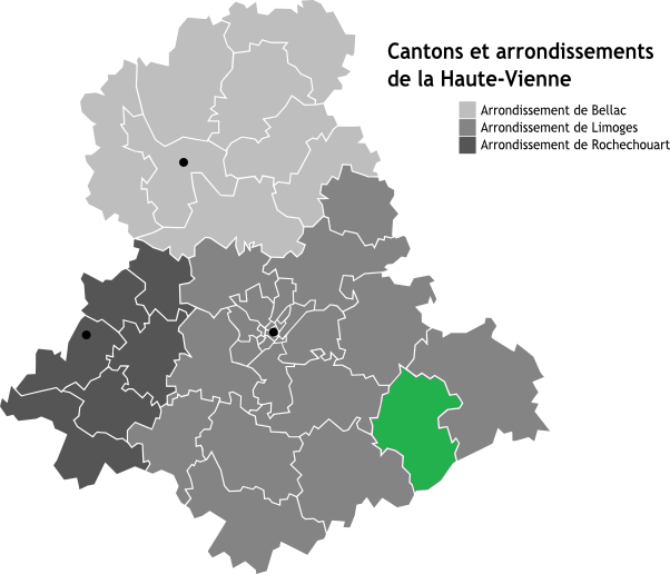 Canton de Châteauneuf-la-Forêt, Limousin, France en Carte des arrondissements de la Haute-Vienne